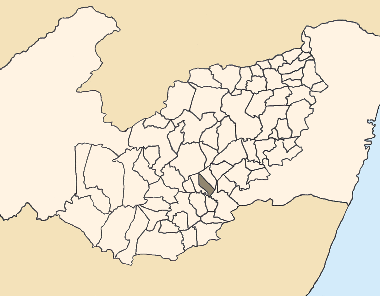 Mapa da mesorregião Agreste de Pernambuco (Brasil) subdivida em municípios. Em destaque, o município de Calçado. Map of the brazilian state of Pernambuco (mesorregião Agreste) showing the city of Calçado. Imagem tratada com o GIMP. Image made with GIMP.